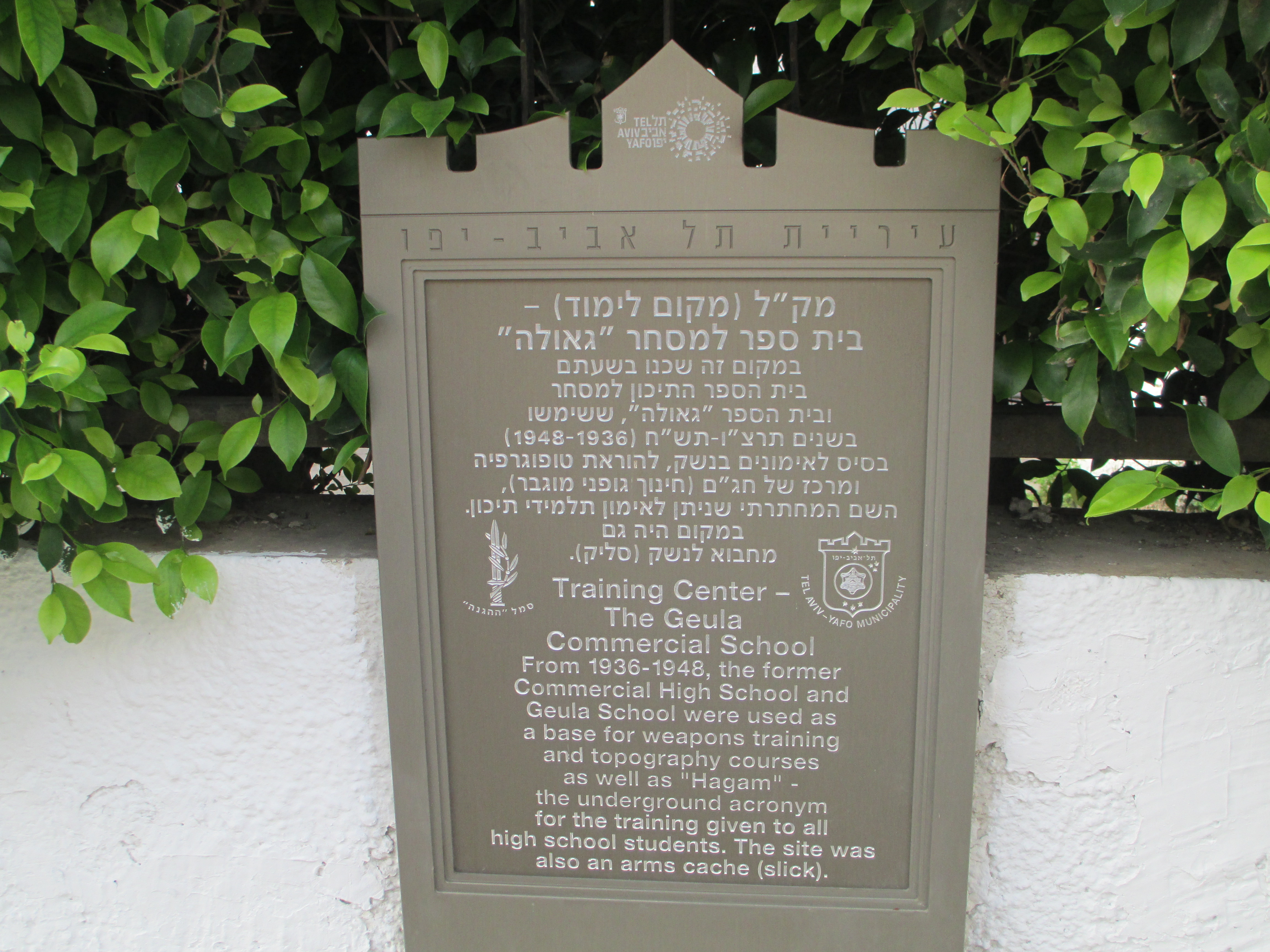 לוחית זיכרון על גדר בי"ס גאולה, לפעילות ההגנה במקום בתקופת המנדט. רח' גאולה 30 בתל אביב